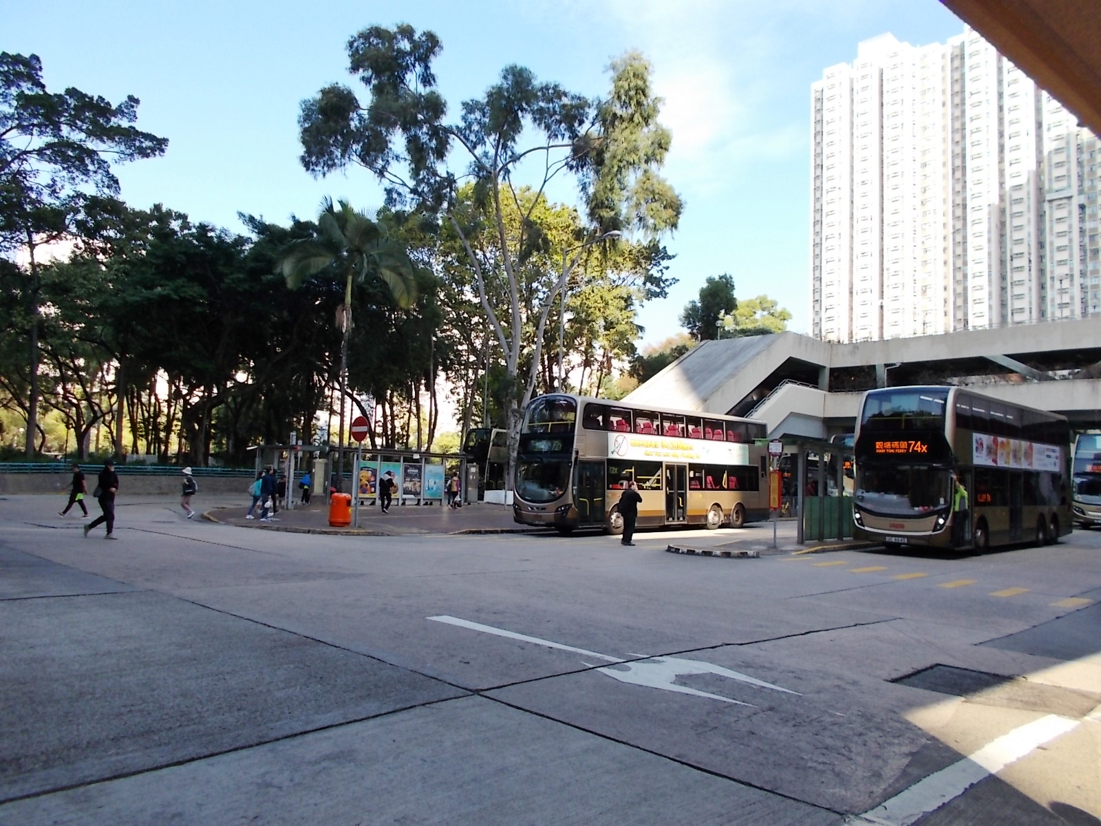 大埔中心巴士總站(2019年)